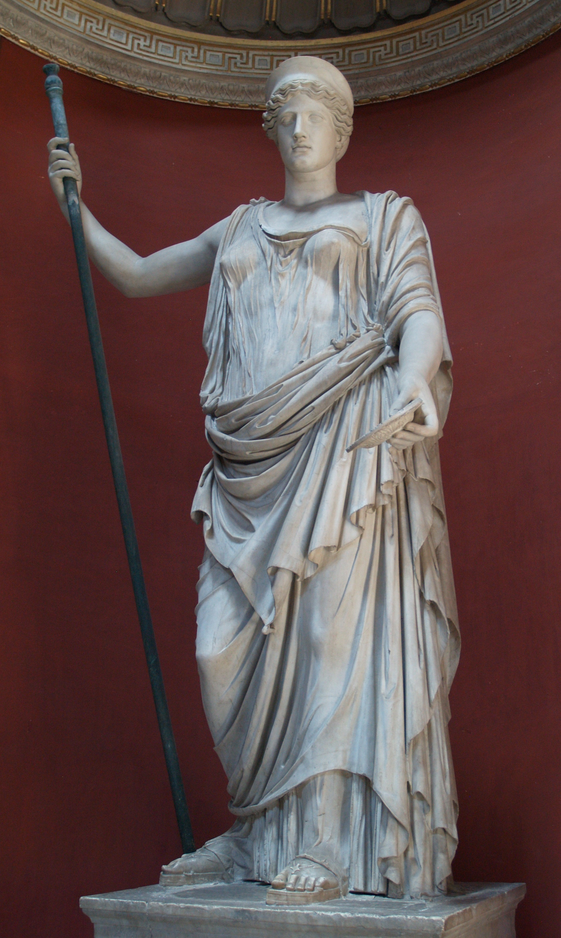 Museos Vaticanos. Hera Barberini.